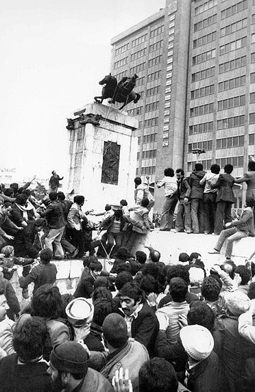 برانداختن تندیس رضاشاه در میدان توپخانه (میدان سپه) در سال 1357 به دست انقلابیون